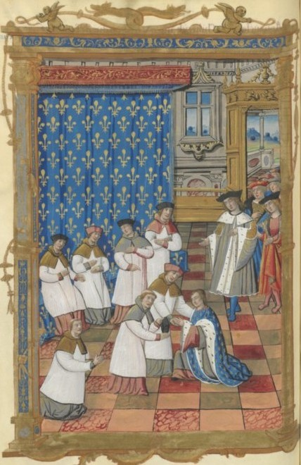 Concile de paris (577). Guillaume Crétin, chroniques françaises. Rouen, France. XVIème siècle, Ier quart (après 1515). Cote Français 2818, Folio 43v.